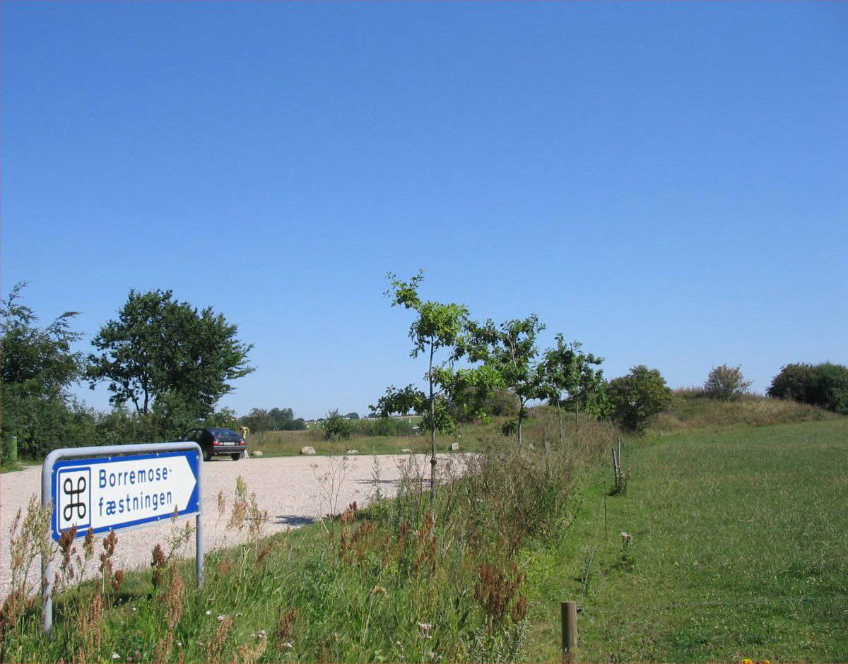 Skilt til Borromose-fæstningen, Borremose, Denmark